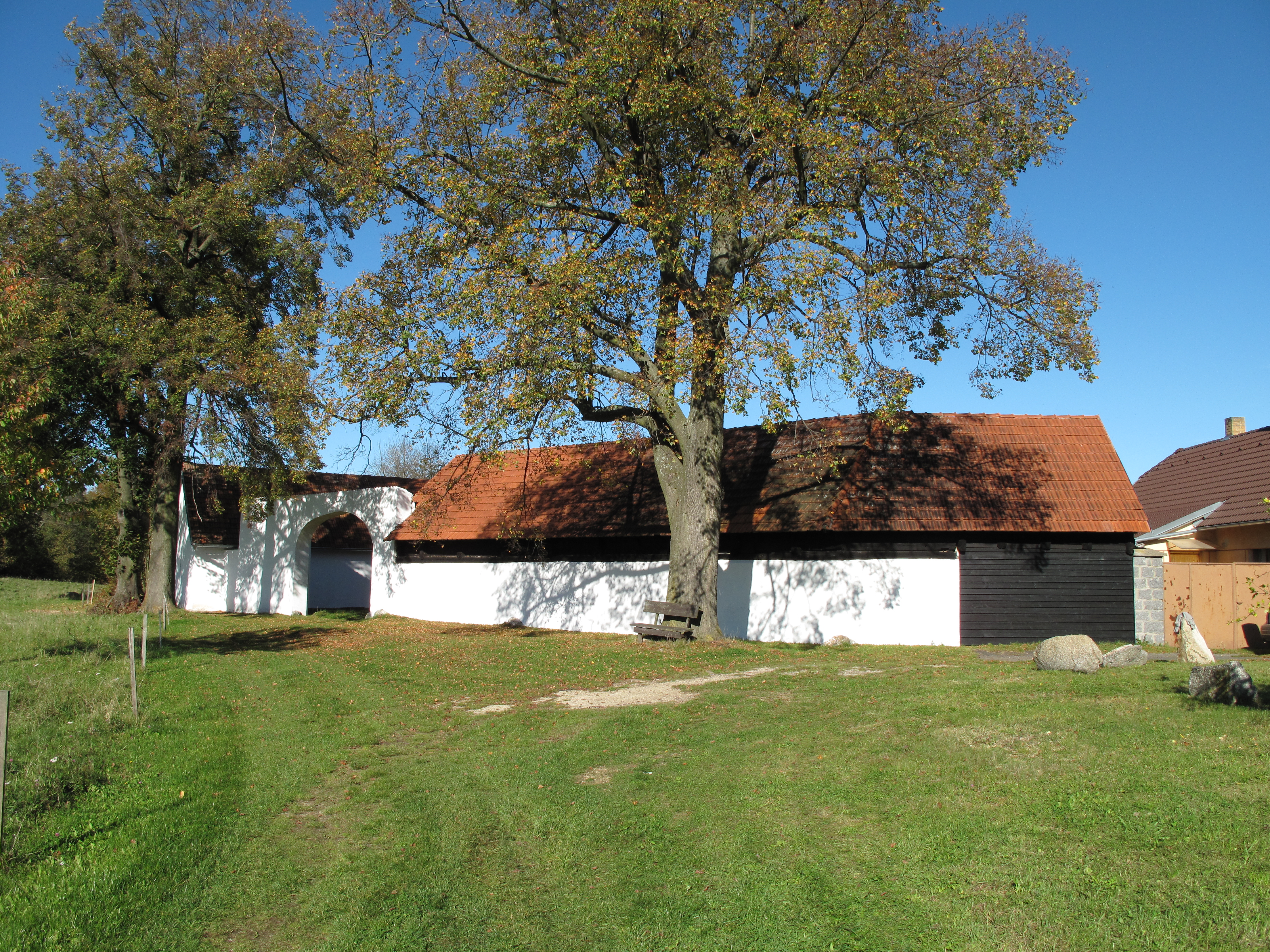 Strom a dům v Hodkově. Okres Příbram, Česká republika.